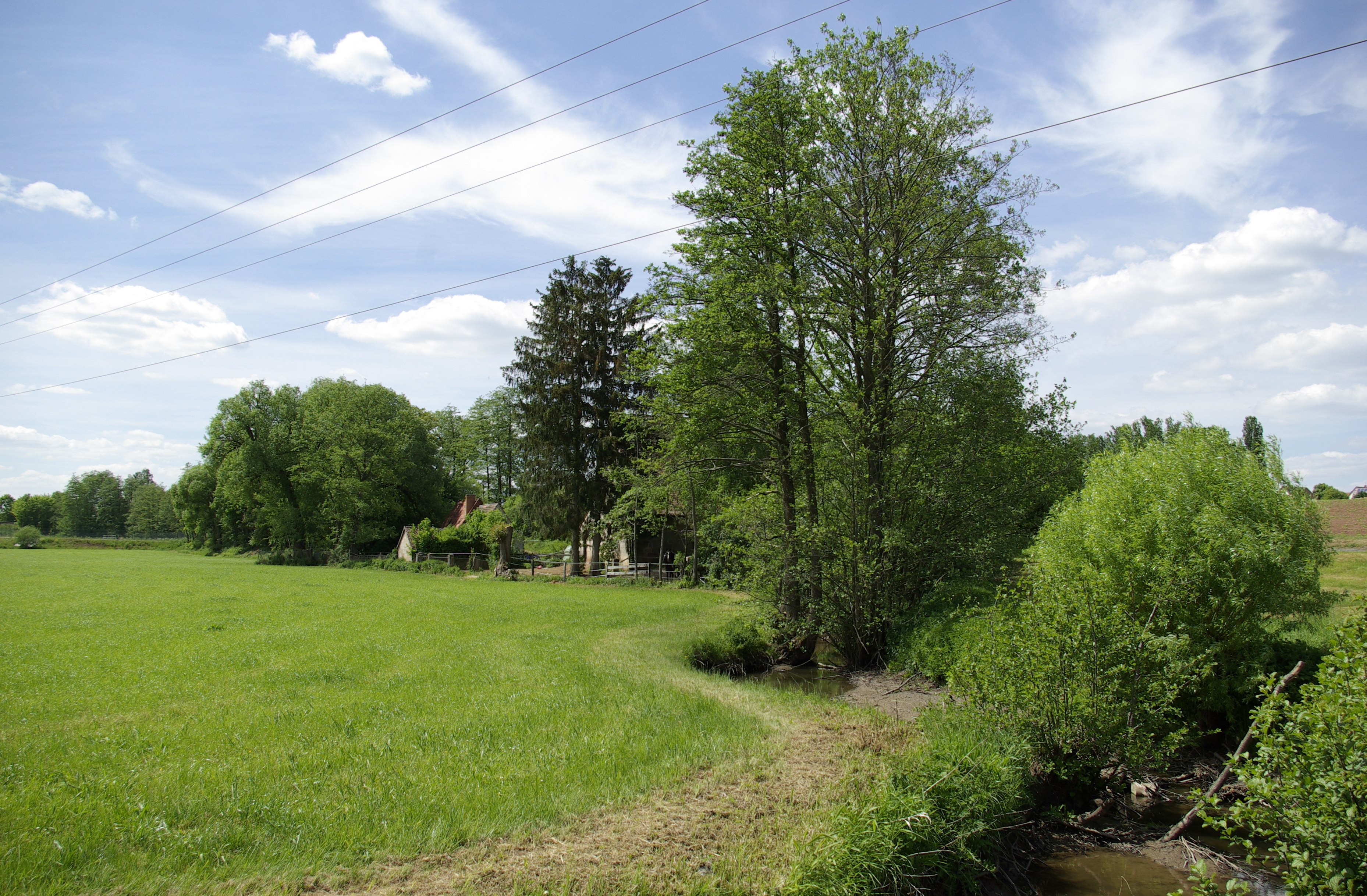 Der Farrnbach-Mühlbach vor der Kohlersmühle in der Gemeinde Seukendorf im Landkreis Fürth. Teil des Landschaftsschutzgebietes Seukendorf-Veitsbronn.